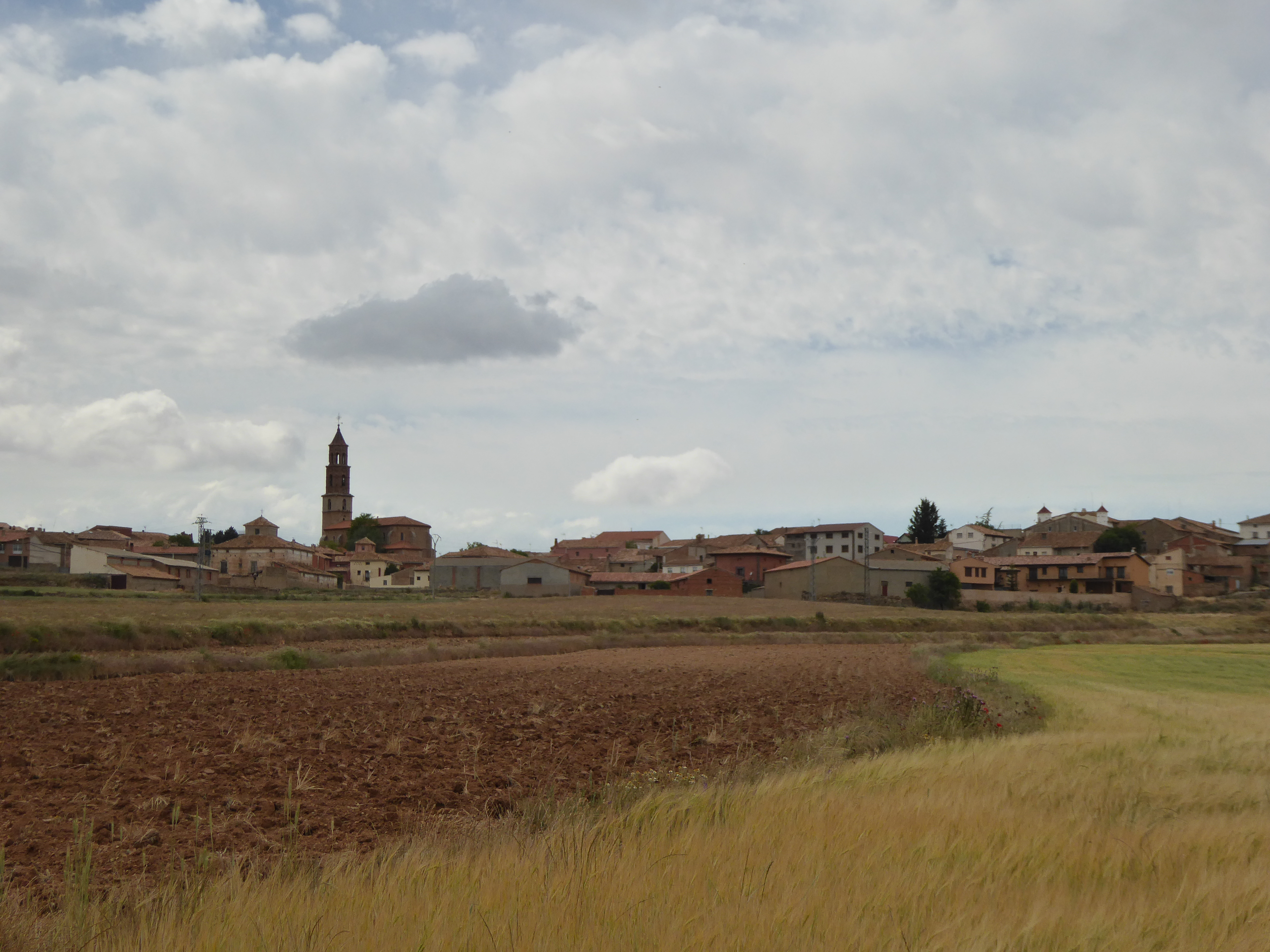 Camañas